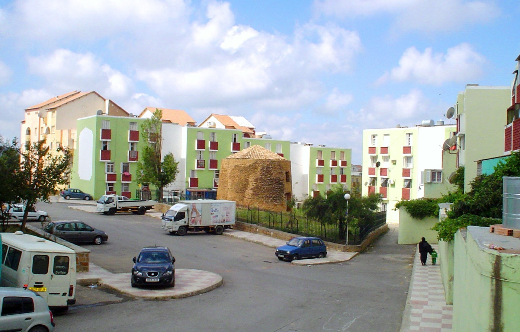 حي الصلى بمدينة المدية - الجزائر